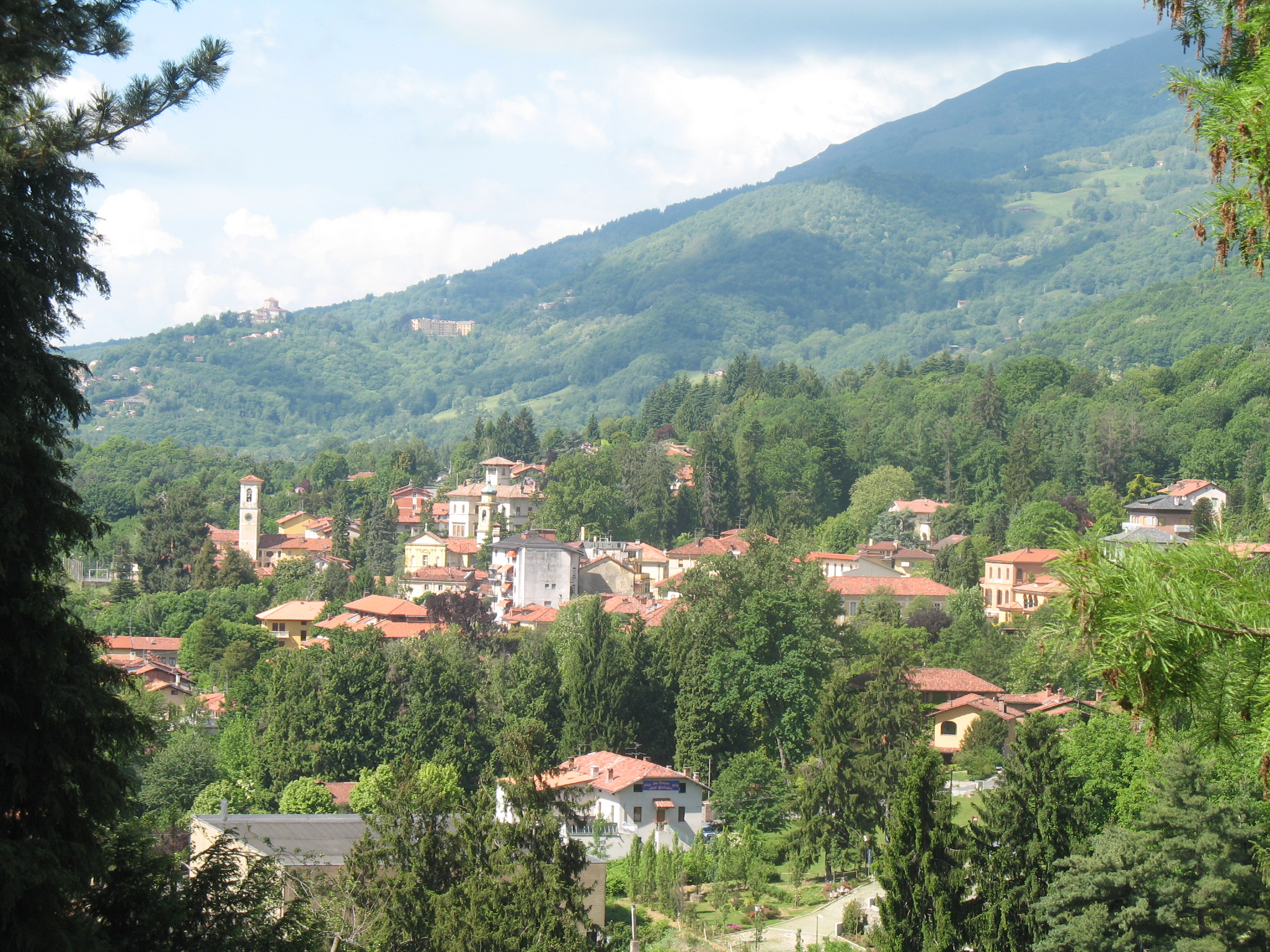 Parco della Burcina, Biella, Piemonte, Italia